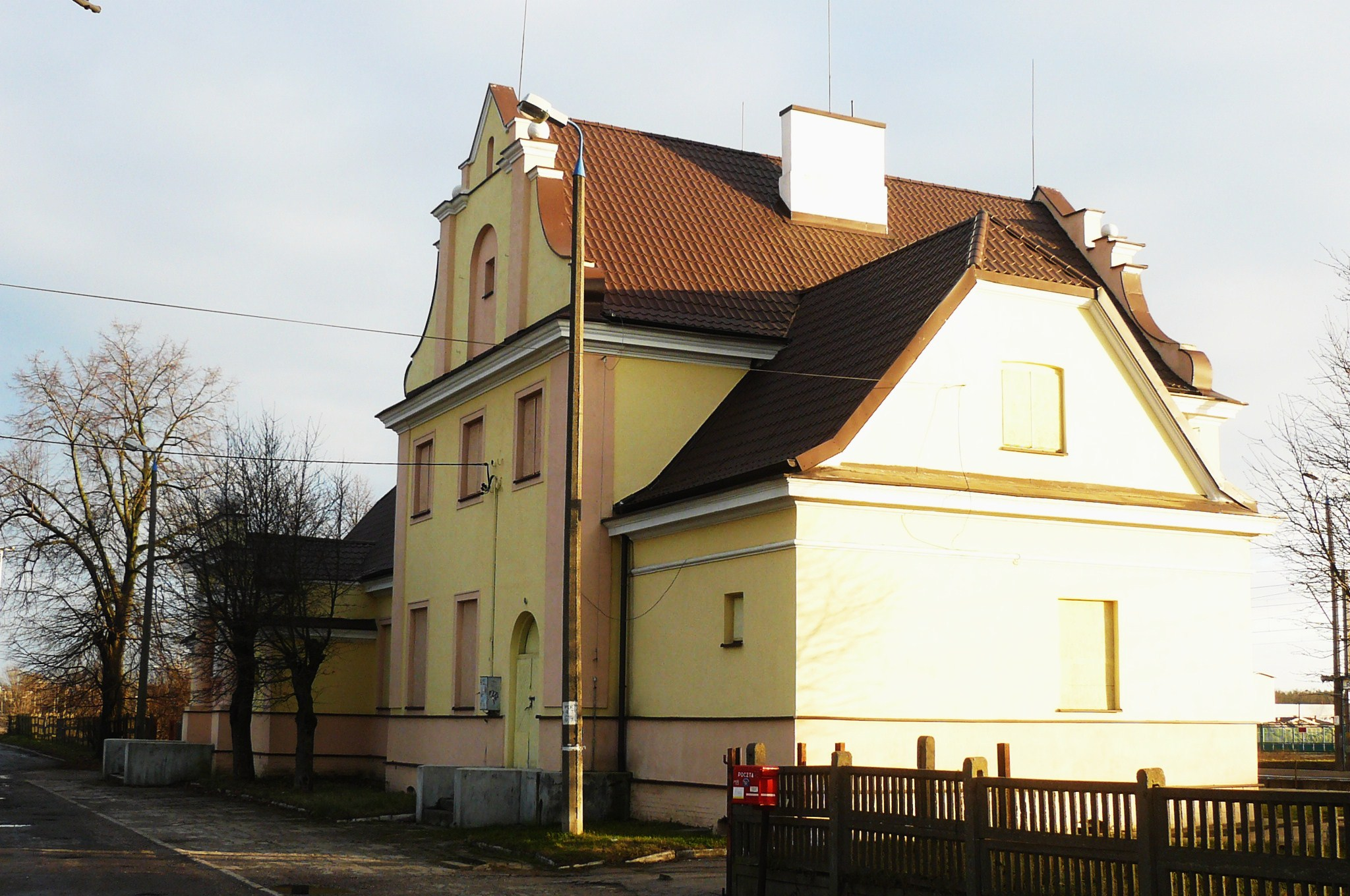 Dworzec w Gostyninie. 2014r.